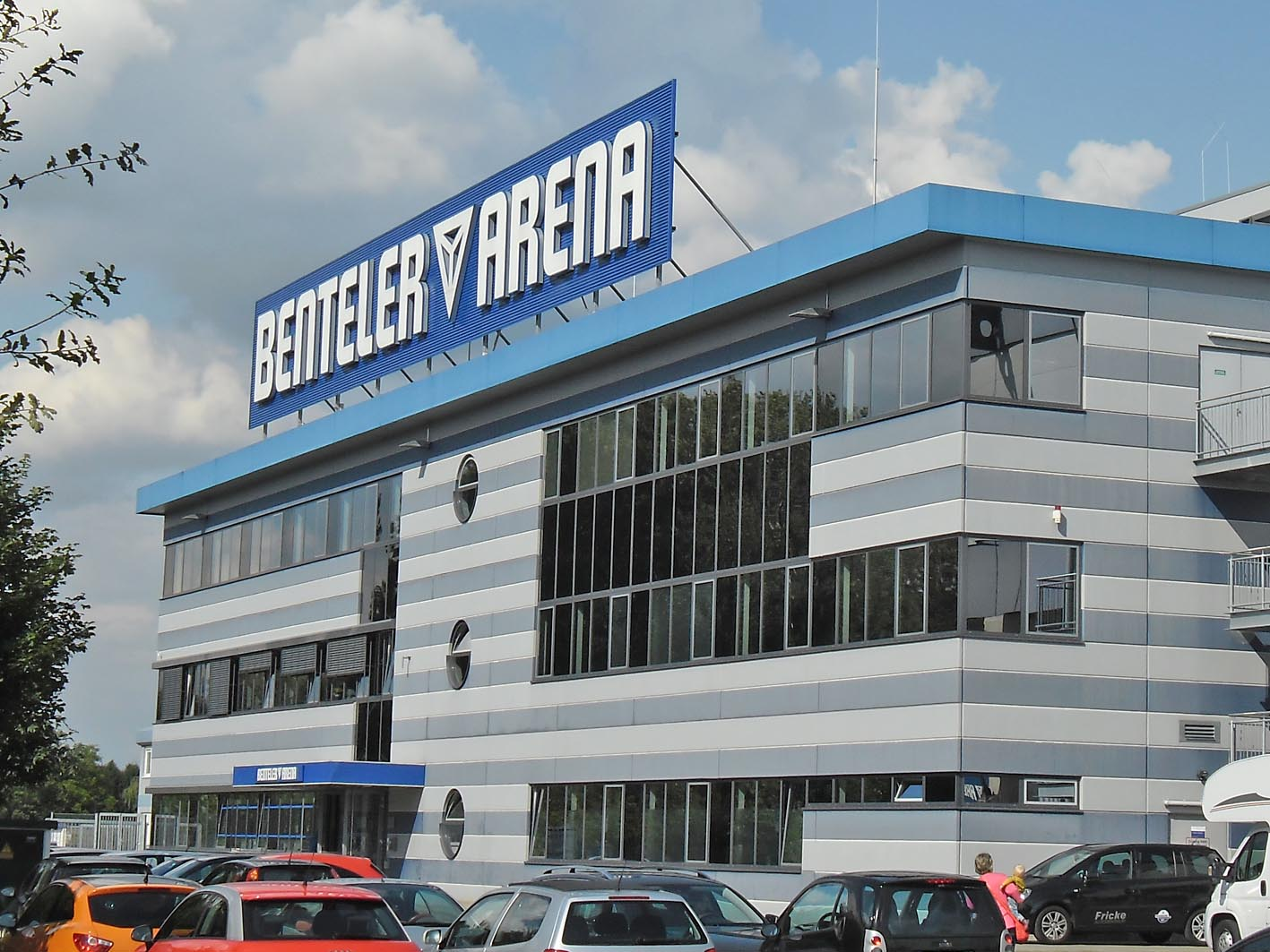 Deitsch: Die Benteler-Arena in Paderborn 2014